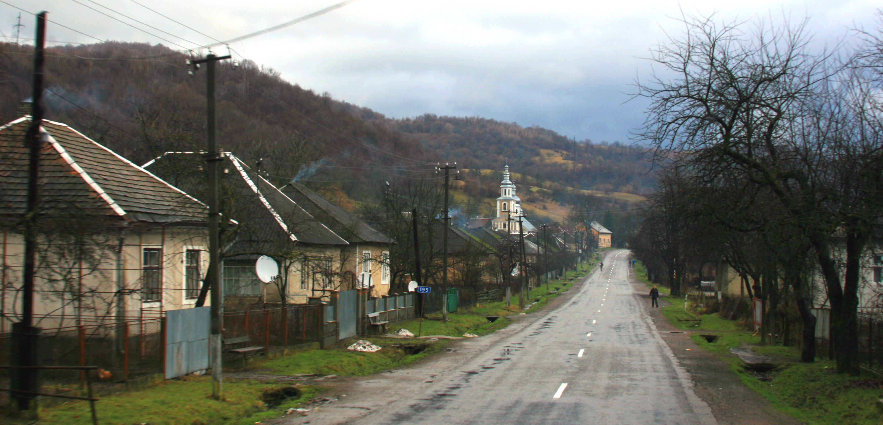 Улица в селе Соль на Закарпатье.